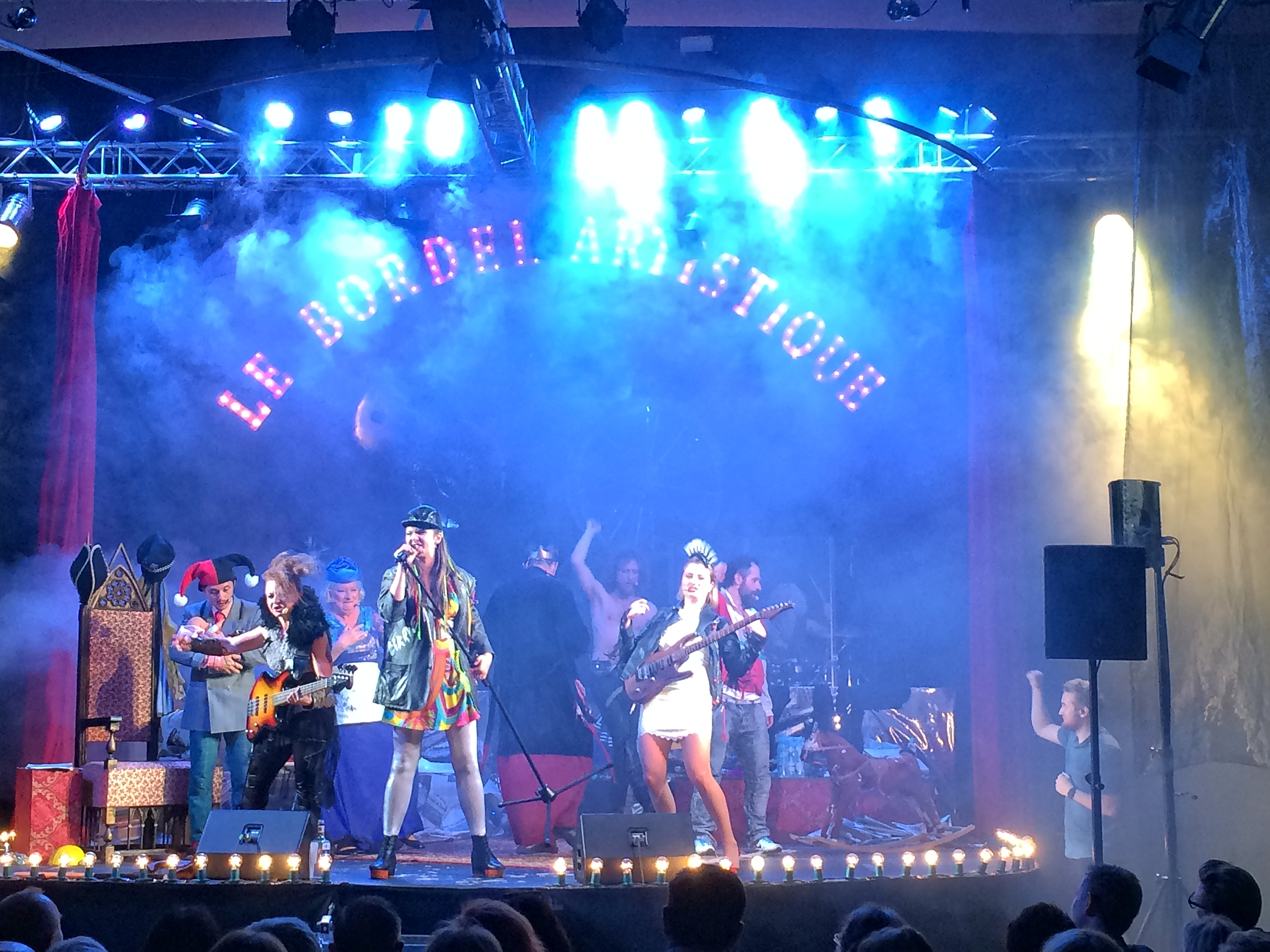 Pożar w burdelu w trakcie przedstawienia Herosi transformacji i miecz Chrobrego (odc. 30) w Teatrze WarSawy